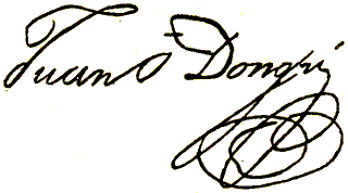 Imagen extraida del libro de Vicente Riva Palacio, Julio Zárate (1880) "México a través de los siglos" Tomo III: "La guerra de independencia" (1808 - 1821)